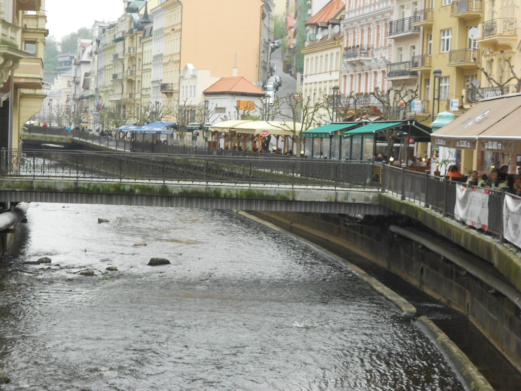 Dragan Cvetkovic Nis Sopstvena slika , Reka Tepla u Ceskoj protice kroz karlove Vari, 2013.g. Licensing